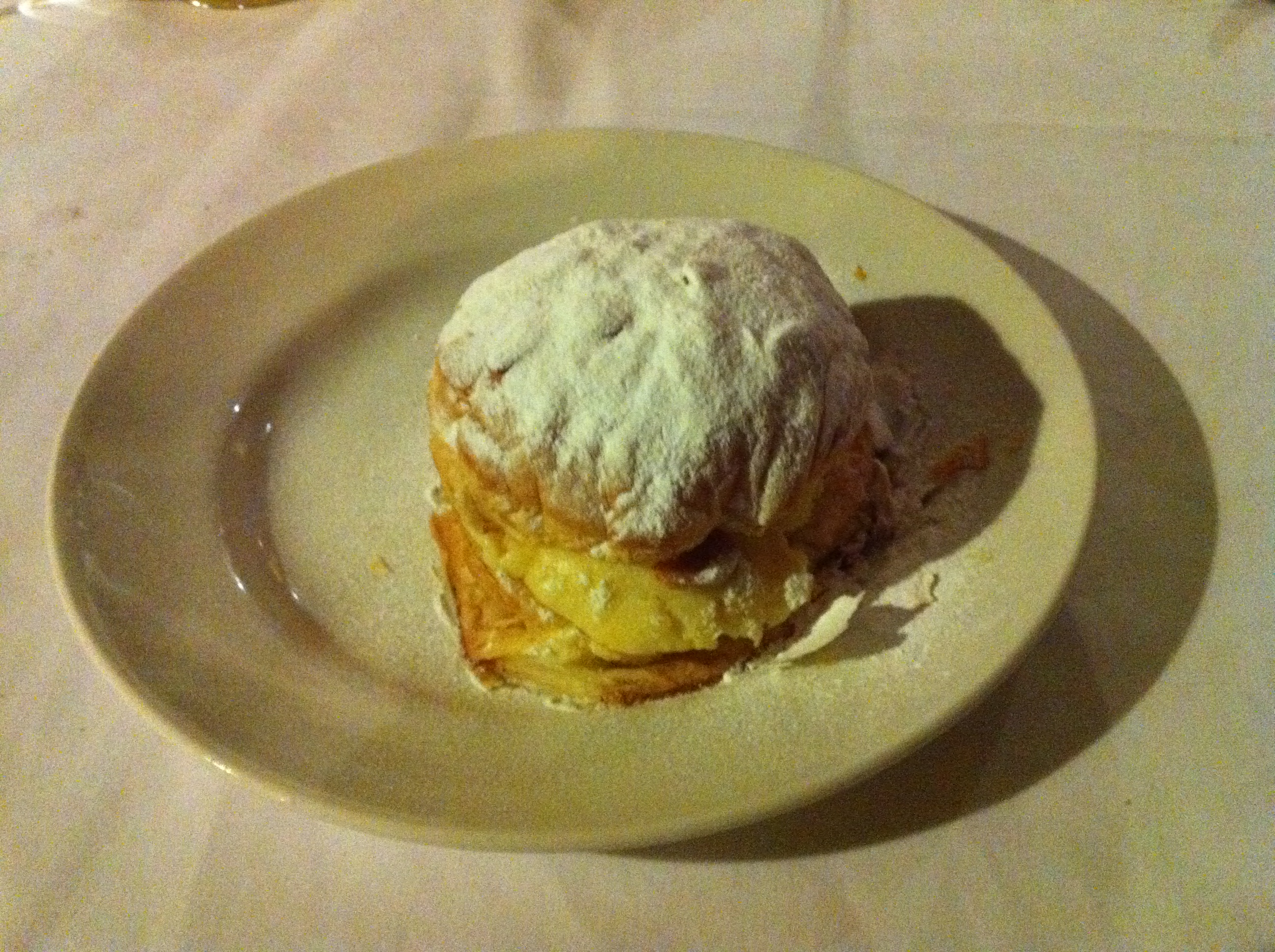 Pantxineta